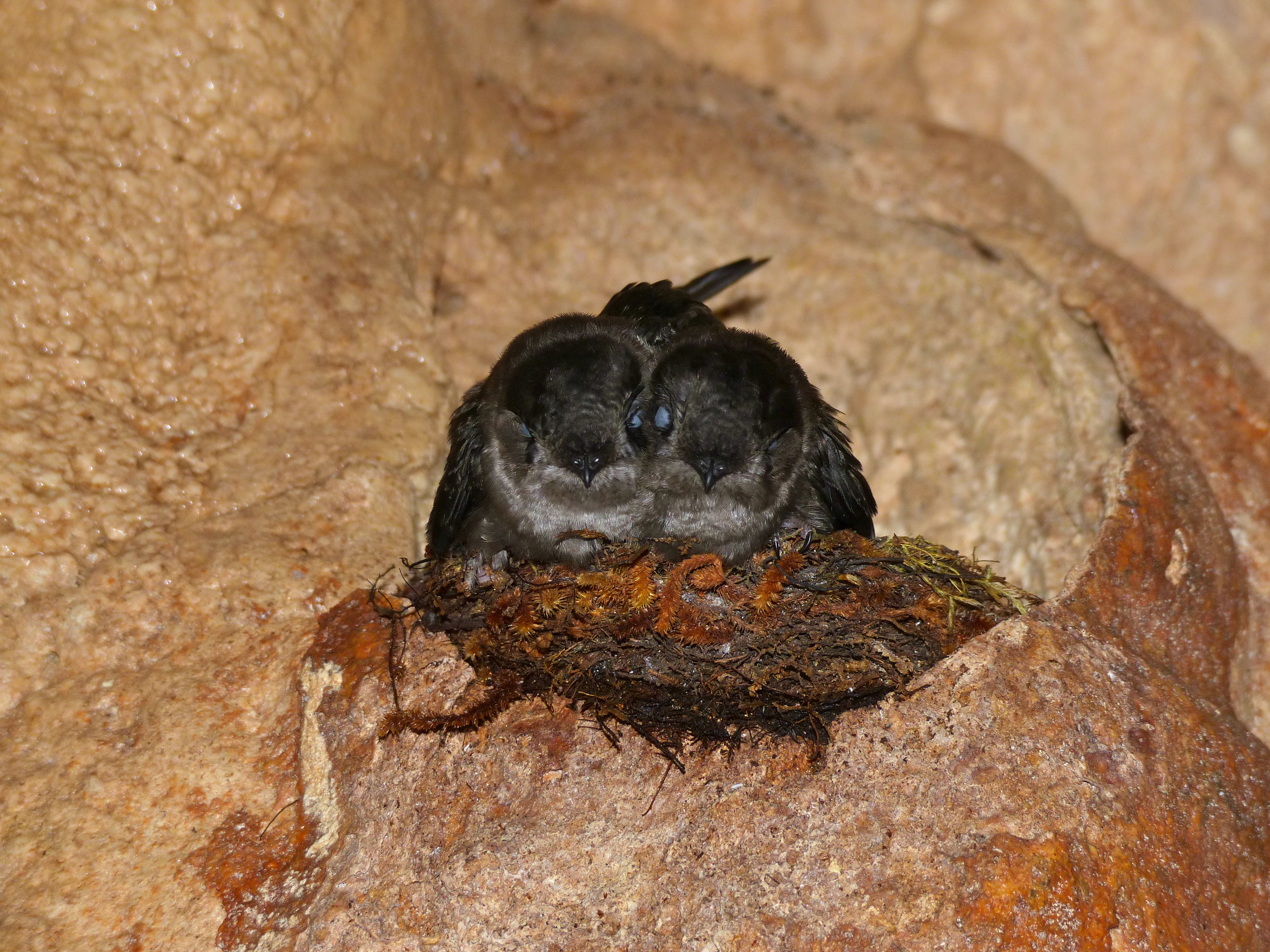 Lagang Cave, Mulu NP, Sarawak, MALAYSIA